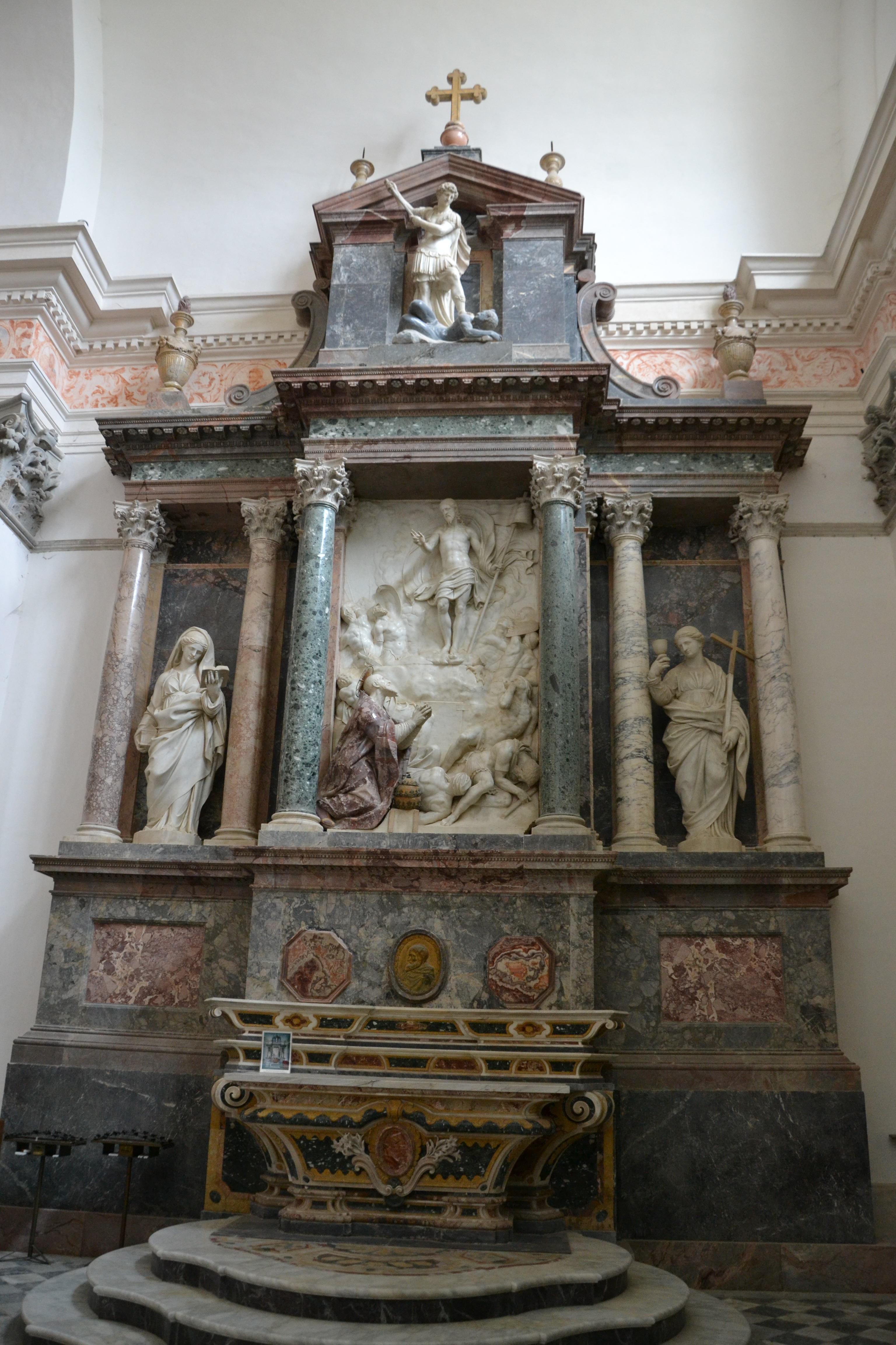 convento domenicano di Santa Croce a Bosco Marengo (AL) realizzato per volontà di papa Pio V nella seconda metà del sec. XVI, nel 1862 divenne riformatorio giovanile fino al 1989.